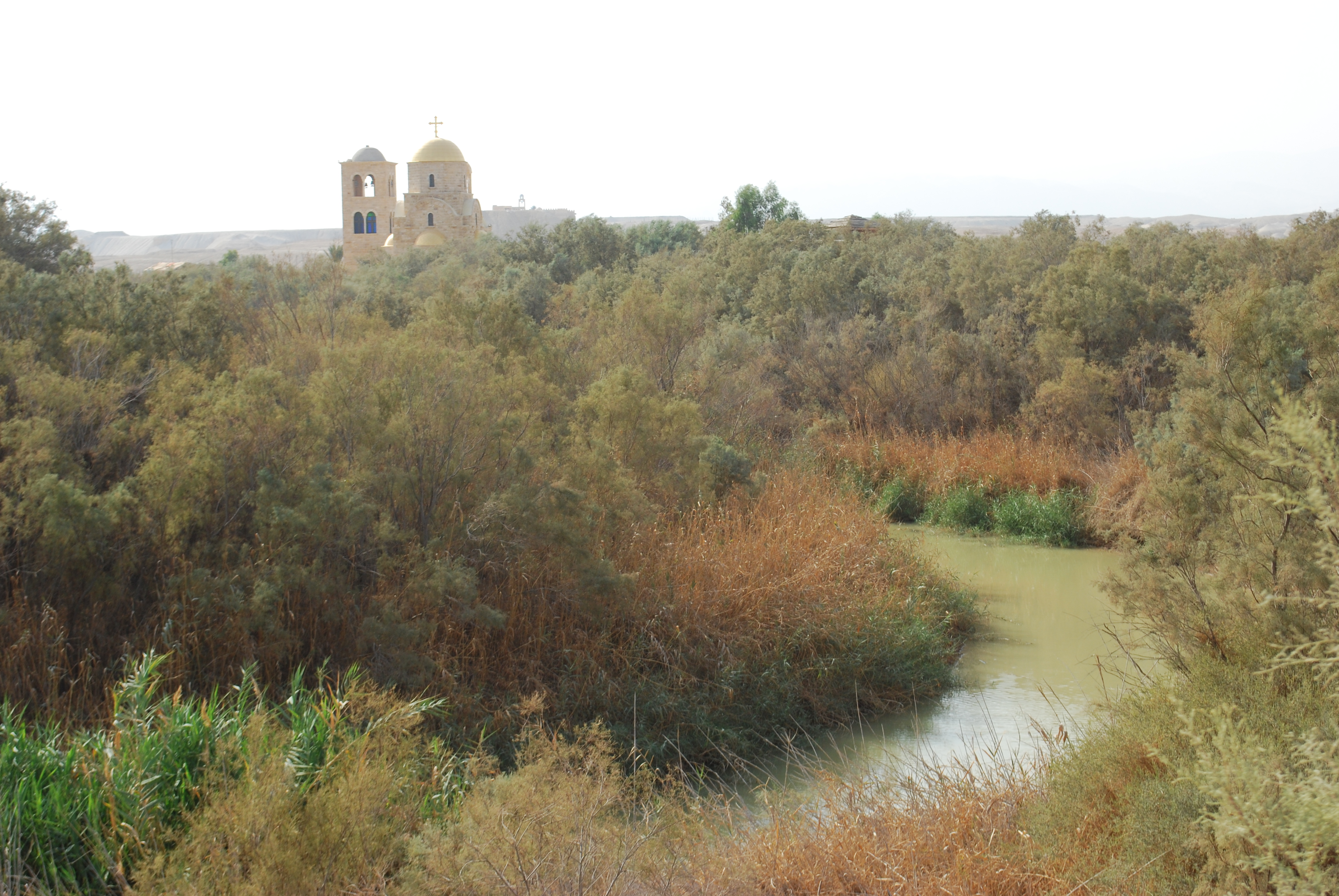 Le Jourdain au site du Baptême, Jordanie.